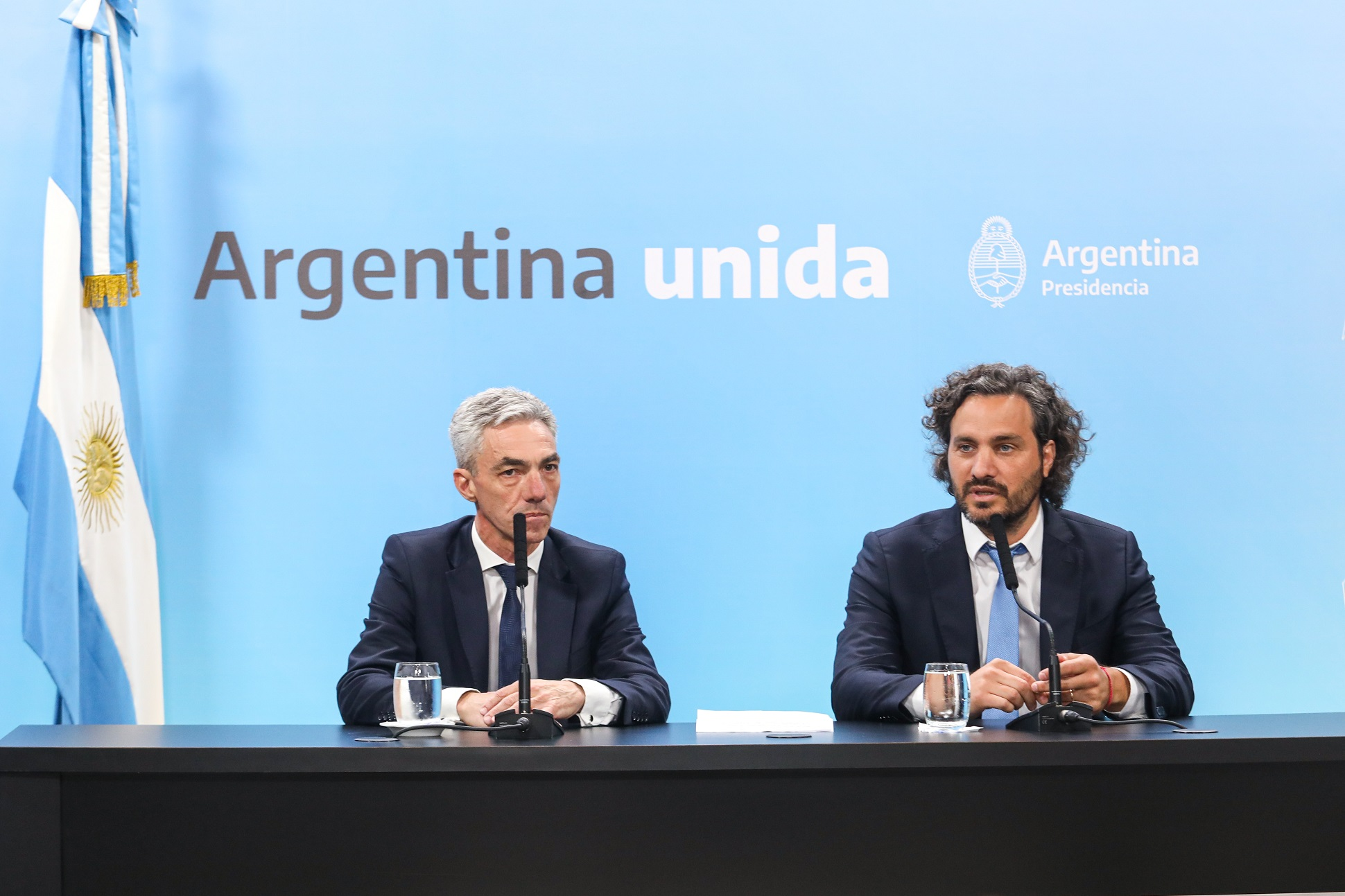 El jefe de Gabinete, Santiago Cafiero, y el ministro de Transporte, Mario Meoni, anunciaron hoy que se mantendrán las tarifas actuales de colectivos y trenes por un plazo de 120 días en el Área Metropolitana de Buenos Aires, iniciativa que beneficia aproximadamente a 15 millones de pasajeros.